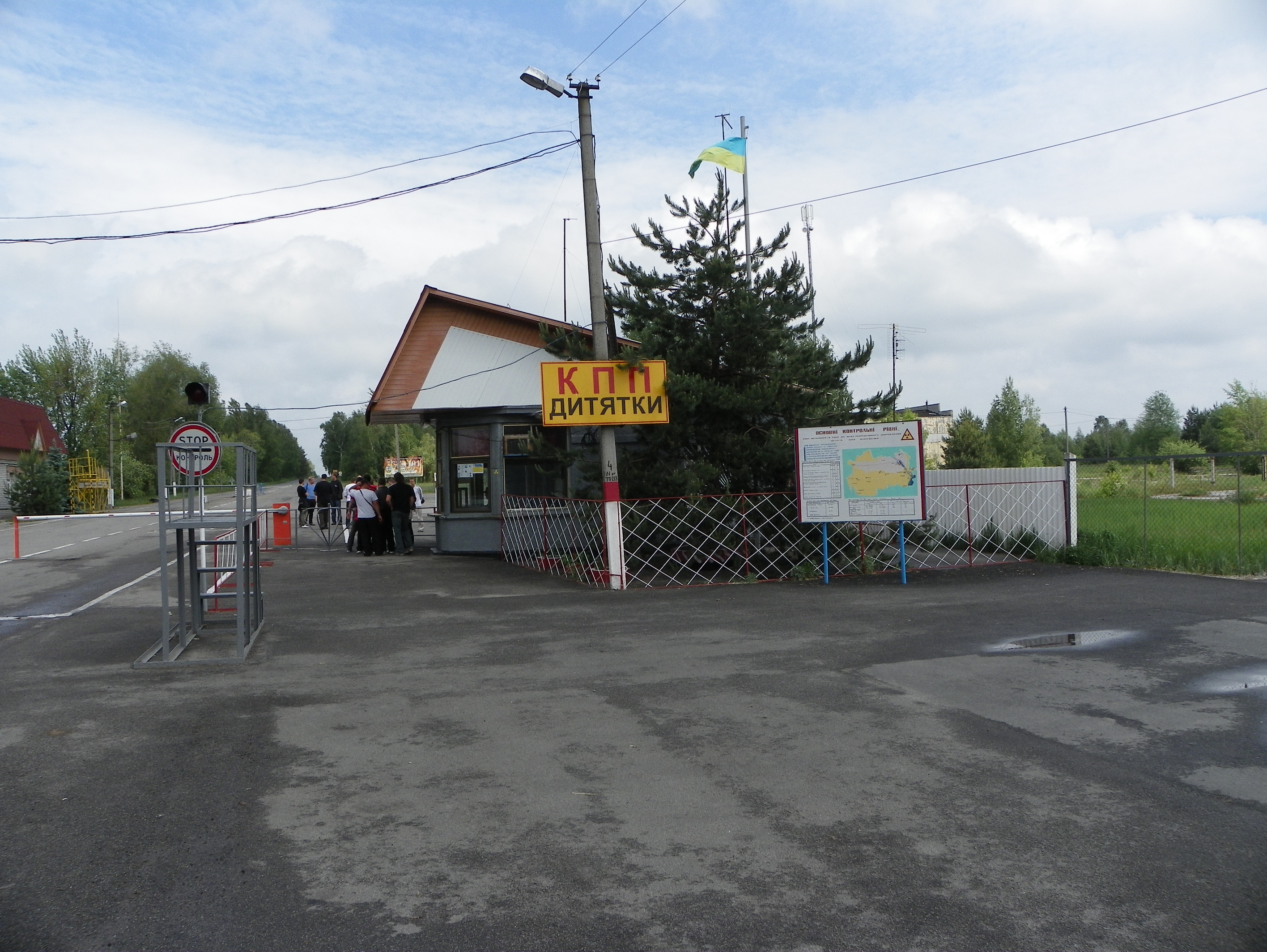 Дорога до КПП "Дитятки"